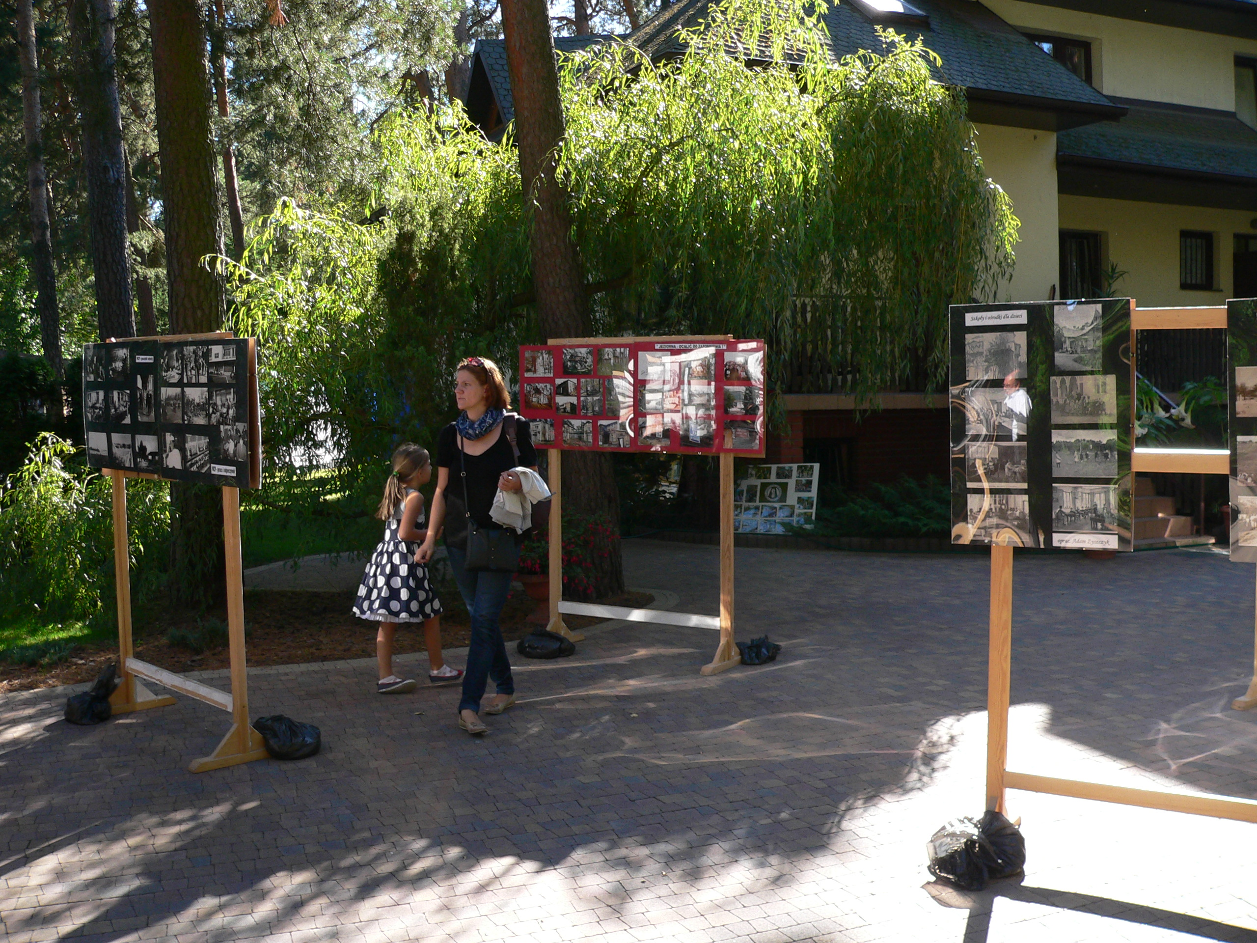 Ogród Historyczno-Krajoznawczy na Festiwalu Otwarte Ogrody, Konstancin-Jeziorna, IX.2013